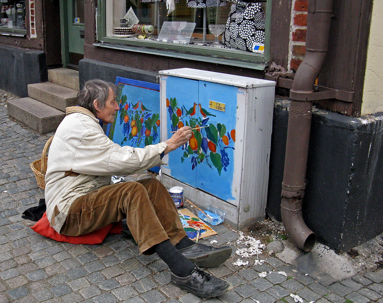 Gerhard Nordström dekorerade ett elskåp på Stora Östergatan i Ystad 30 maj 2010.